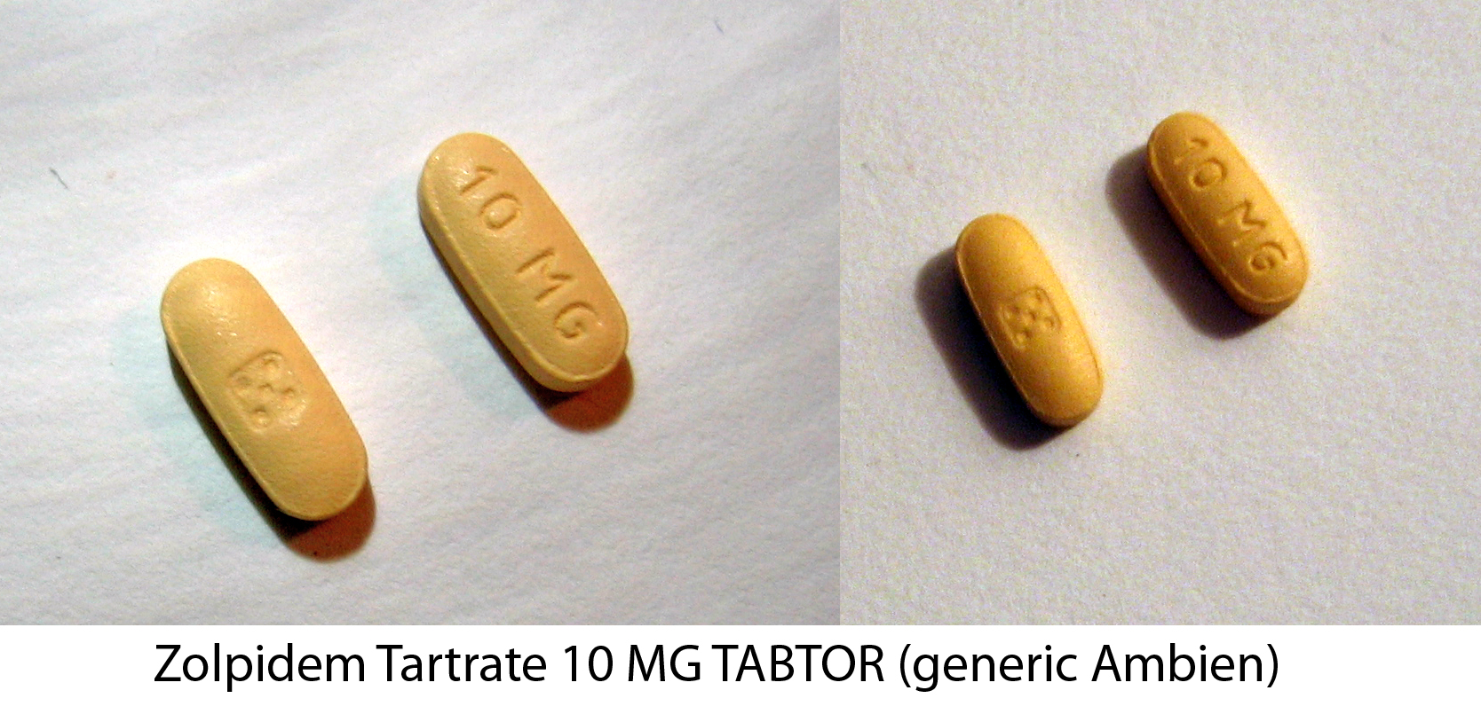 Zolpidem Tartrate 10 MG